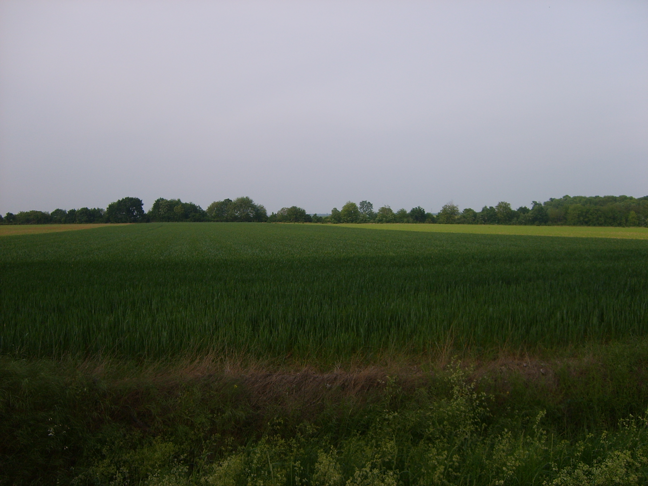 Le chemin vert depuis la RD319